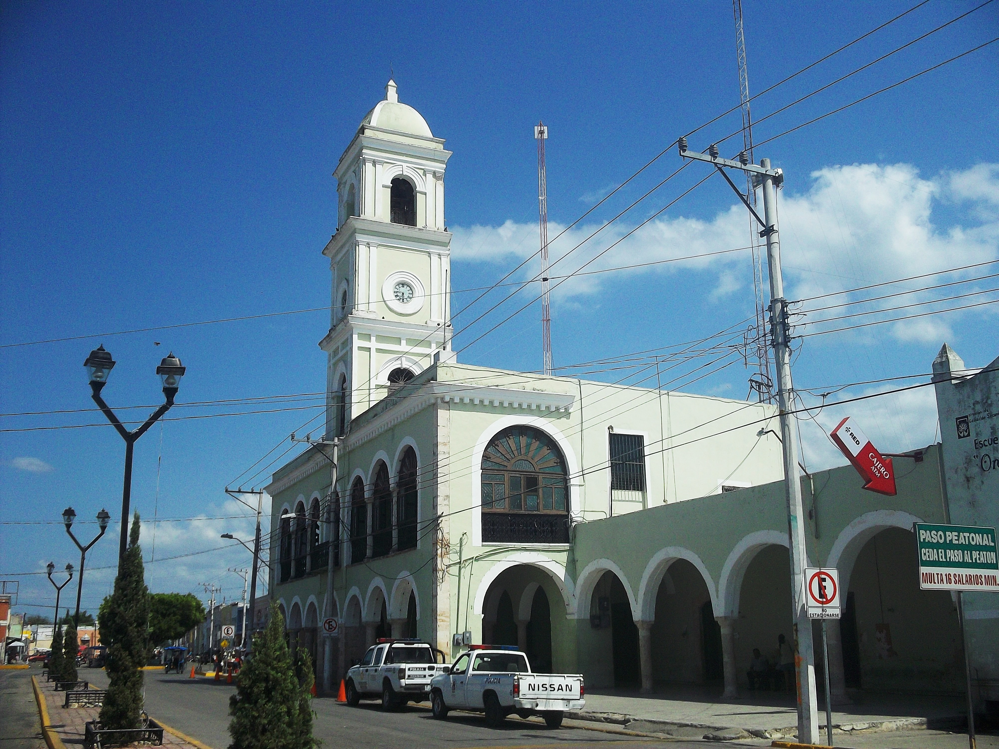 Palacio municipal de Tixkokob, Yucatán.